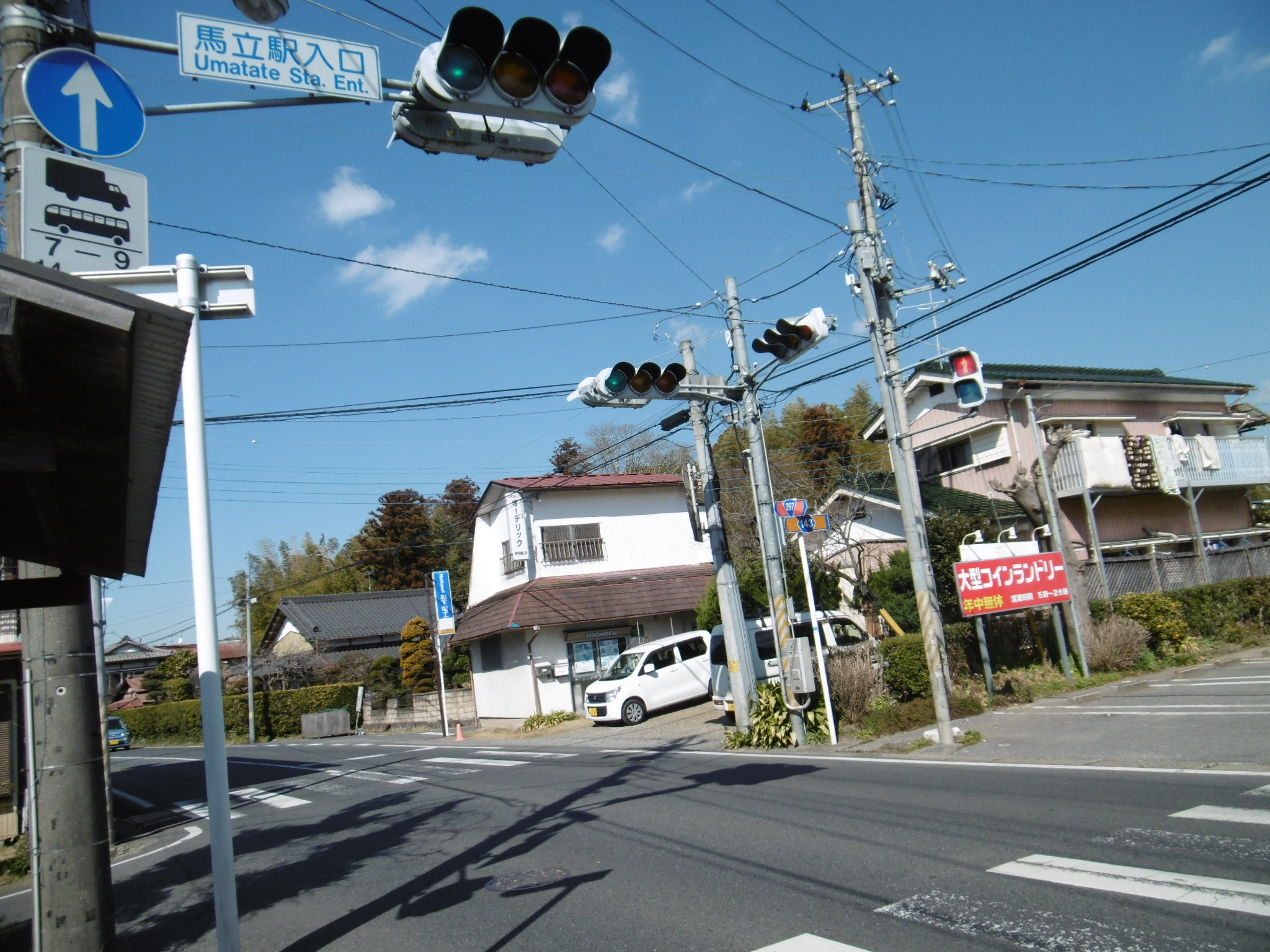 千葉県市原市馬立の小湊鉄道馬立駅入口前の交差点で接する国道297号と千葉県道143号南総昭和線。写真左へ千葉県道143号の道を辿ると馬立駅がある。